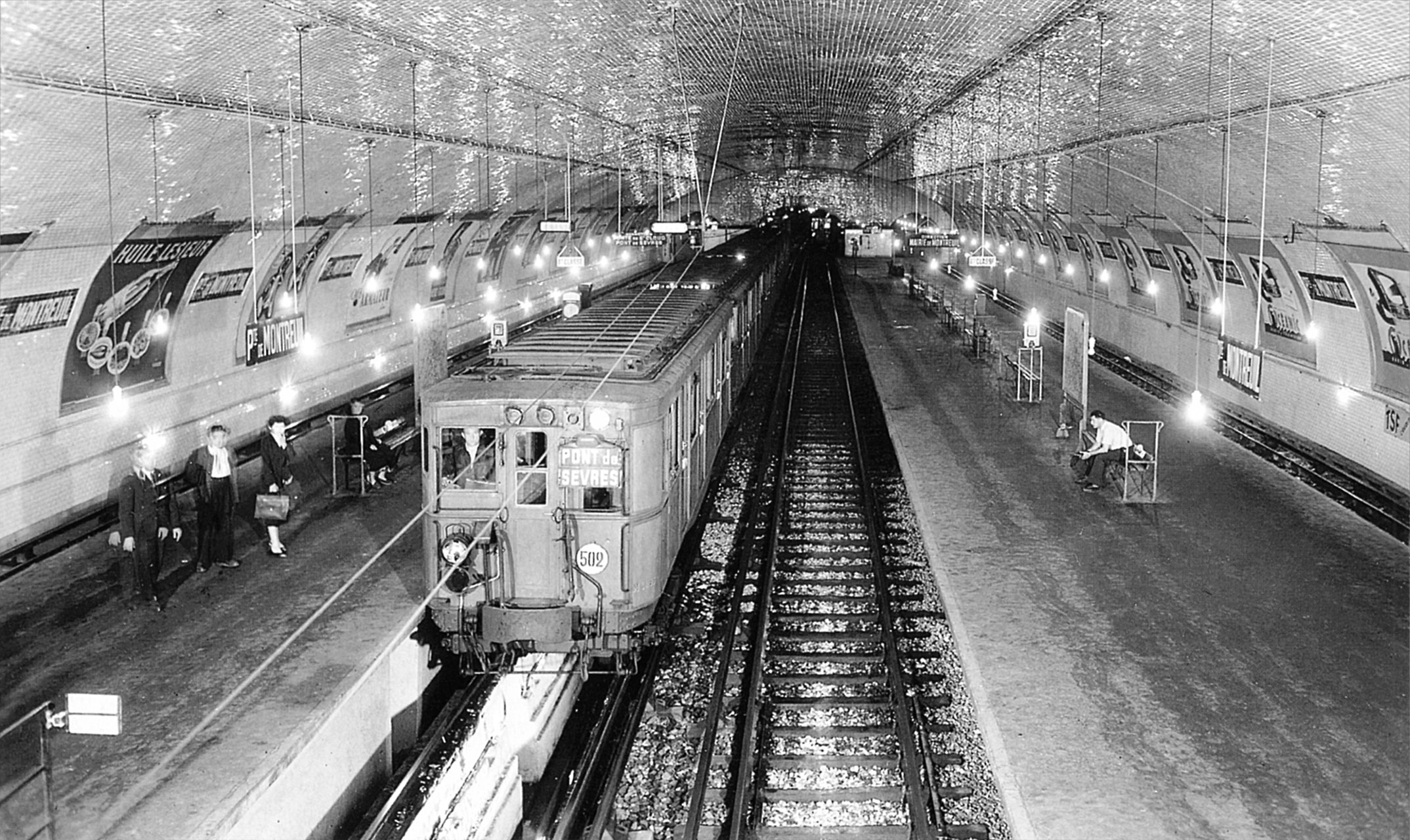 Une rame de la ligne 9 du métro de Paris, France, à la station Porte de Montreuil.